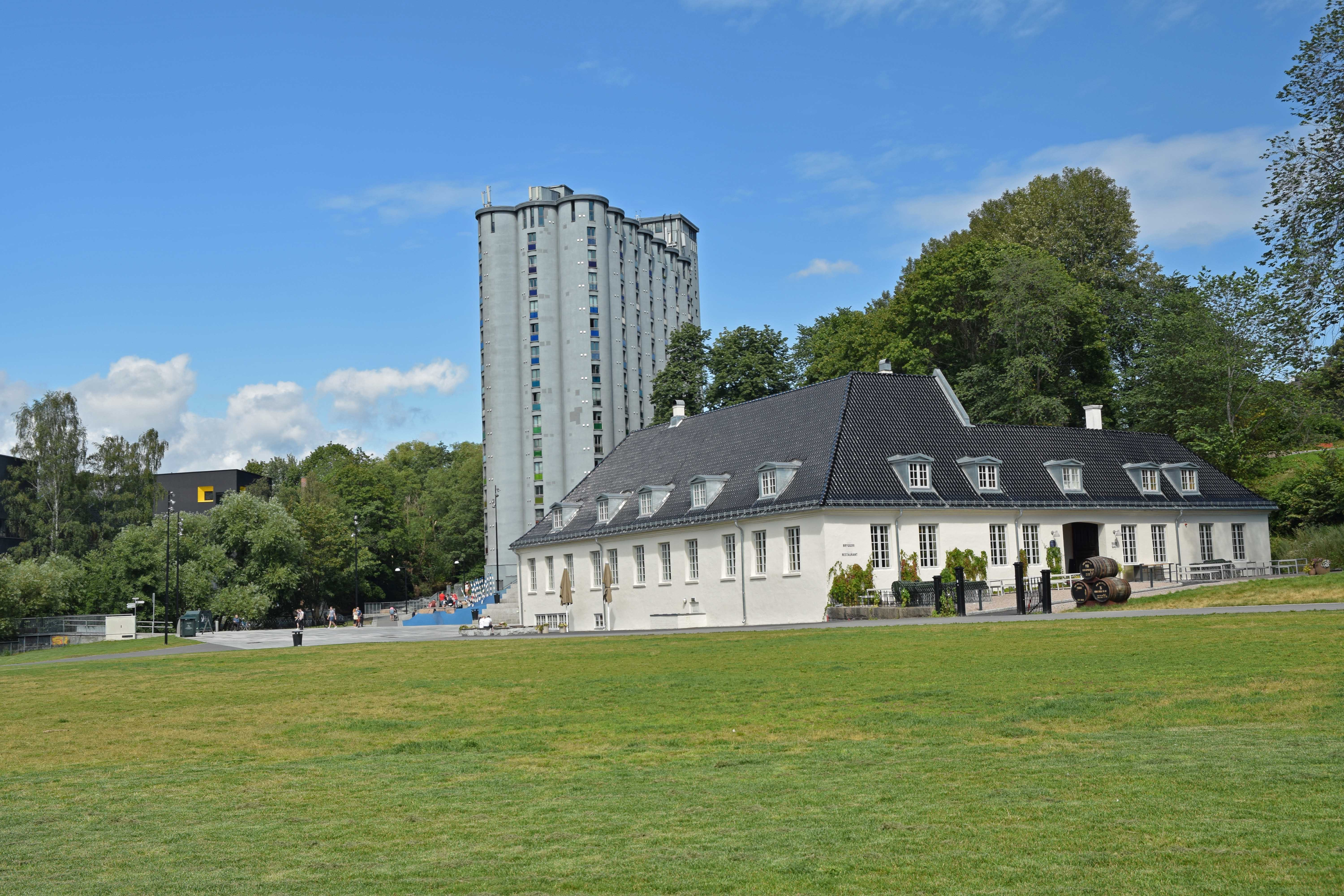 Nedre Foss park, Grünerløkka, med hovedbygningen Nedre Foss gård og siloen Grünerløkka studenhus